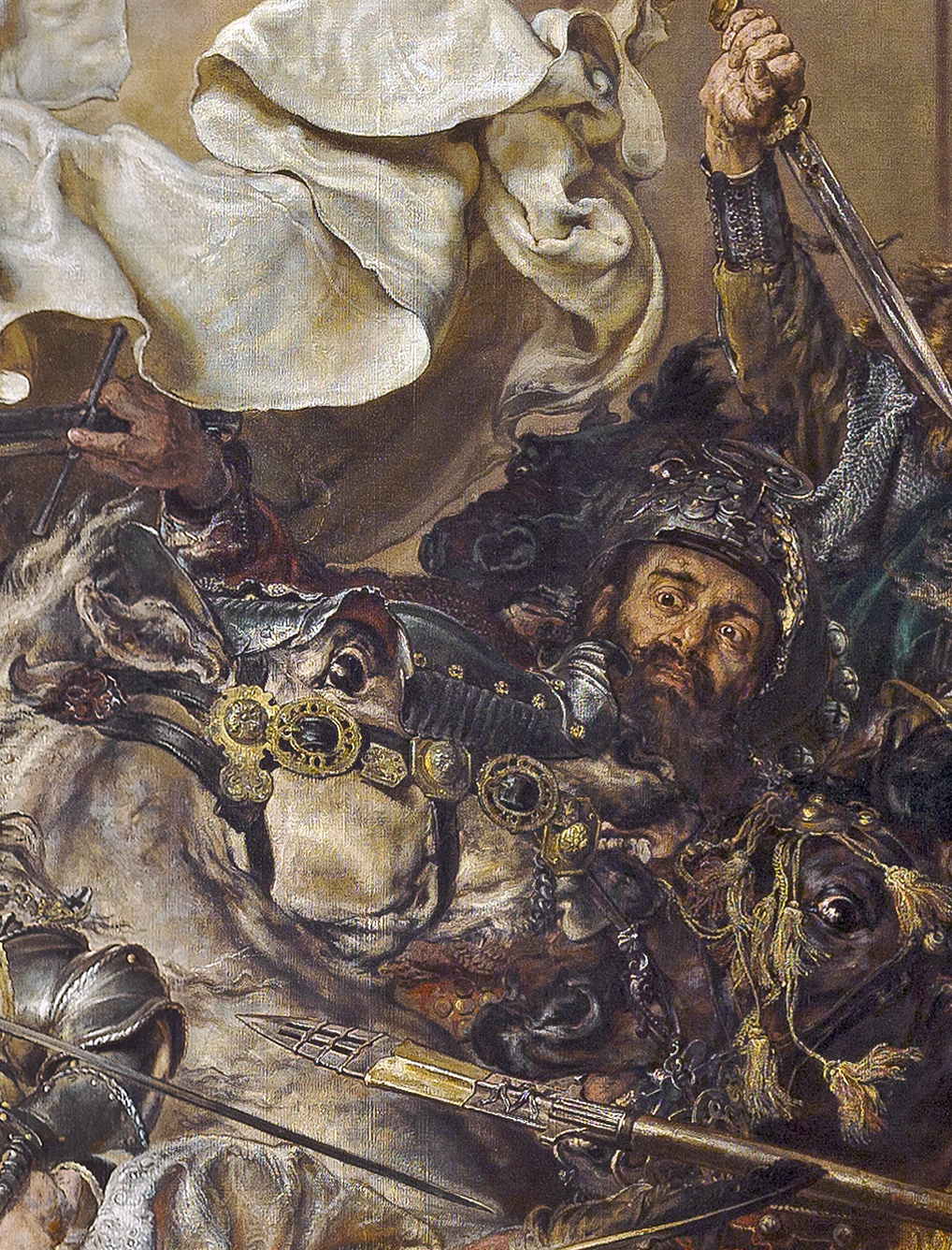 Zyndram z Maszkowic, fragment Bitwy pod Grunwaldem